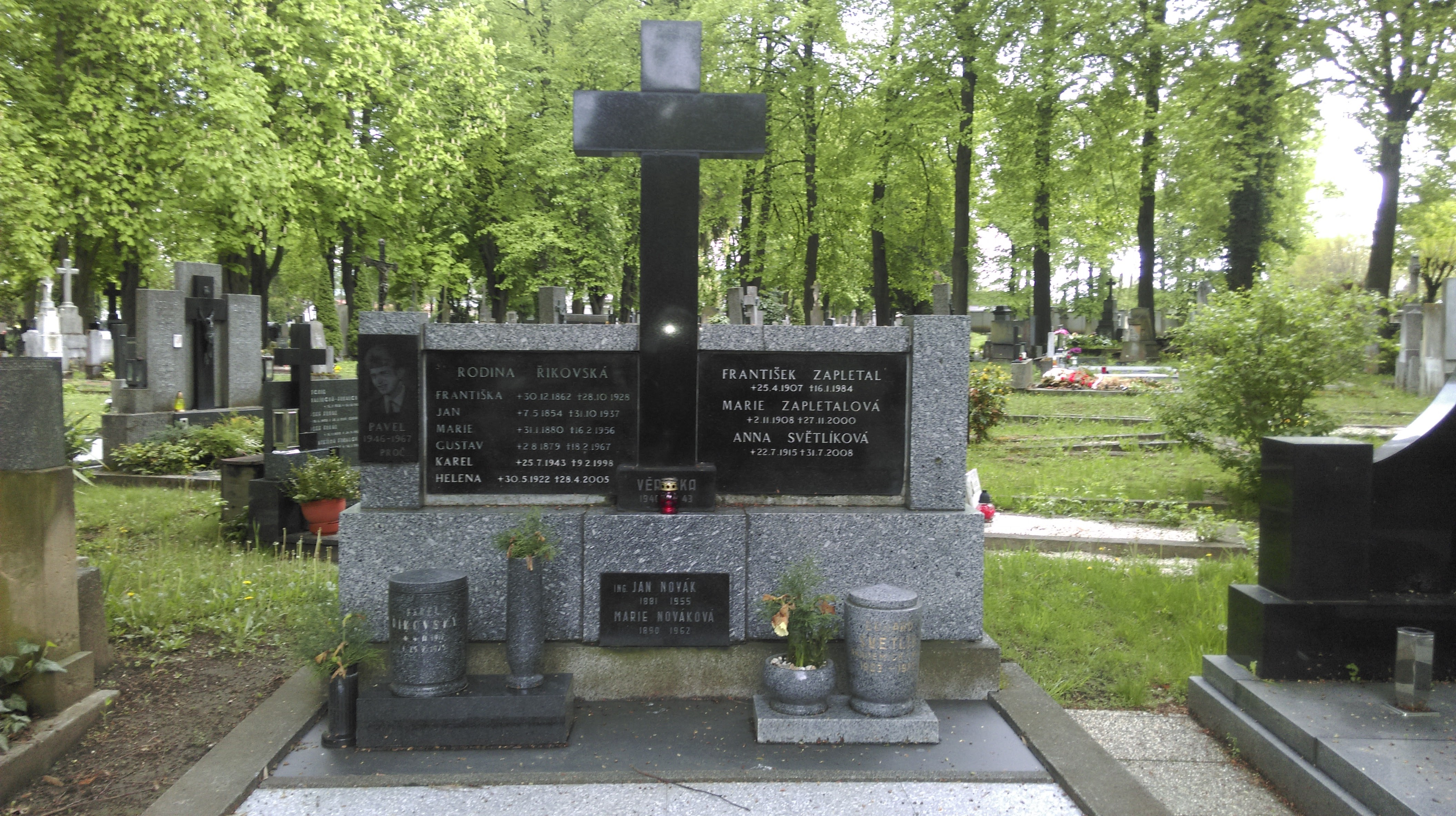 Akademický malíř Eduard Světlík (1903-1970)